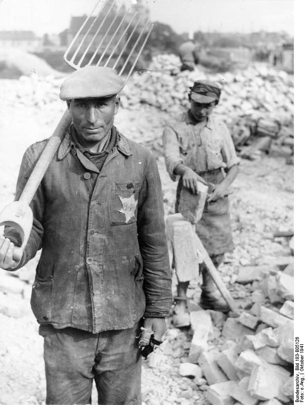 Polen, Posen, Juden bei Zwangsarbeit [Scherl] Polnische Juden lernen arbeiten. Um Platz für den Warthedurchstich in der Posener Vorstadt Wallischei zu schaffen, müssen eine Anzahl Häuser abgebrochen werden. Für diese Arbeiten werden Kolonnen polnischer Juden eingesetzt, die hier zum ersten Mal in ihrem Leben Handarbeit kennenlernen. Fot. Schwahn 27.10.41 [ Herausgabedatum] 9645-41 ADN-ZB/Archiv Polen unter der Okkupation des faschistischen Deutschlands 1939 - 1945 Polnische Juden in Posen (heute Poznan) zur Zwangsarbeit eingesetzt. (Aufn.: Oktober 1941) [Polen, Posen.- jüdische Männer bei Zwangsarbeit, im Hintergrund Junge beim Säubern von Ziegelsteinen]